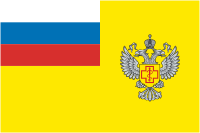 Флаг Роспотребнадзора